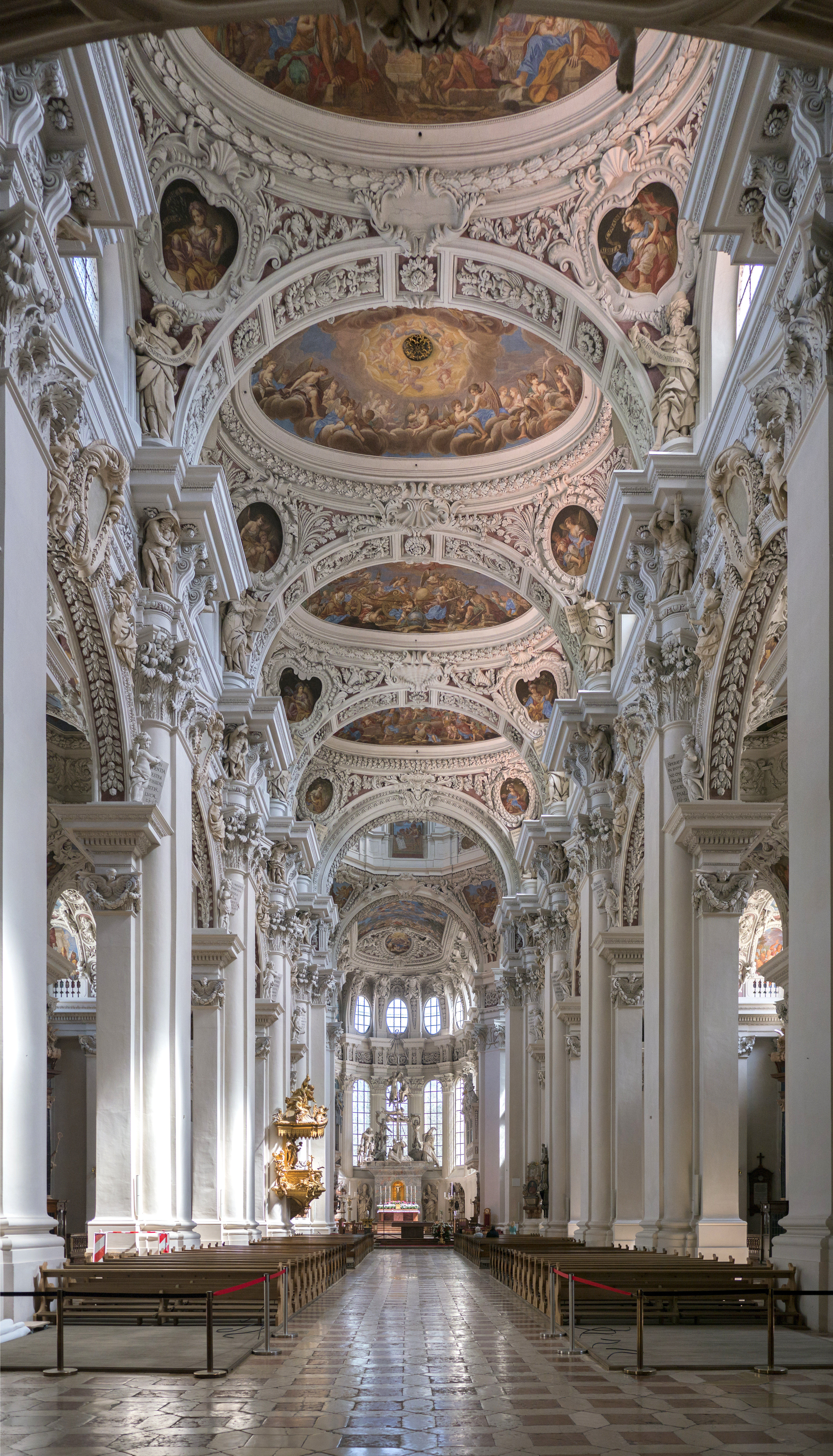 Passauer Dom Innenansicht